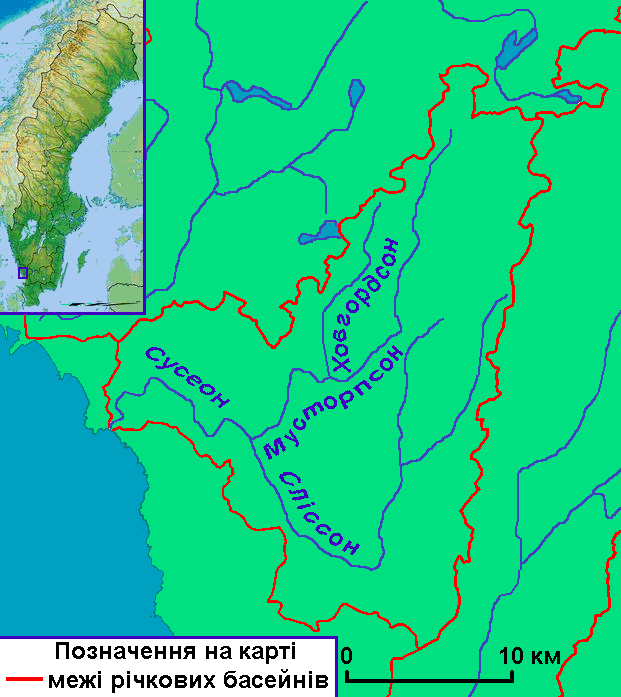 Карта річки Сусеон на півдні Швеції у лені Галланд. Створено на основі карти річок лену Галланд Hallands län на сайті SMHI Шведського інституту метеорології та гідрології. Використано карту File:Sweden relief location map.jpg.